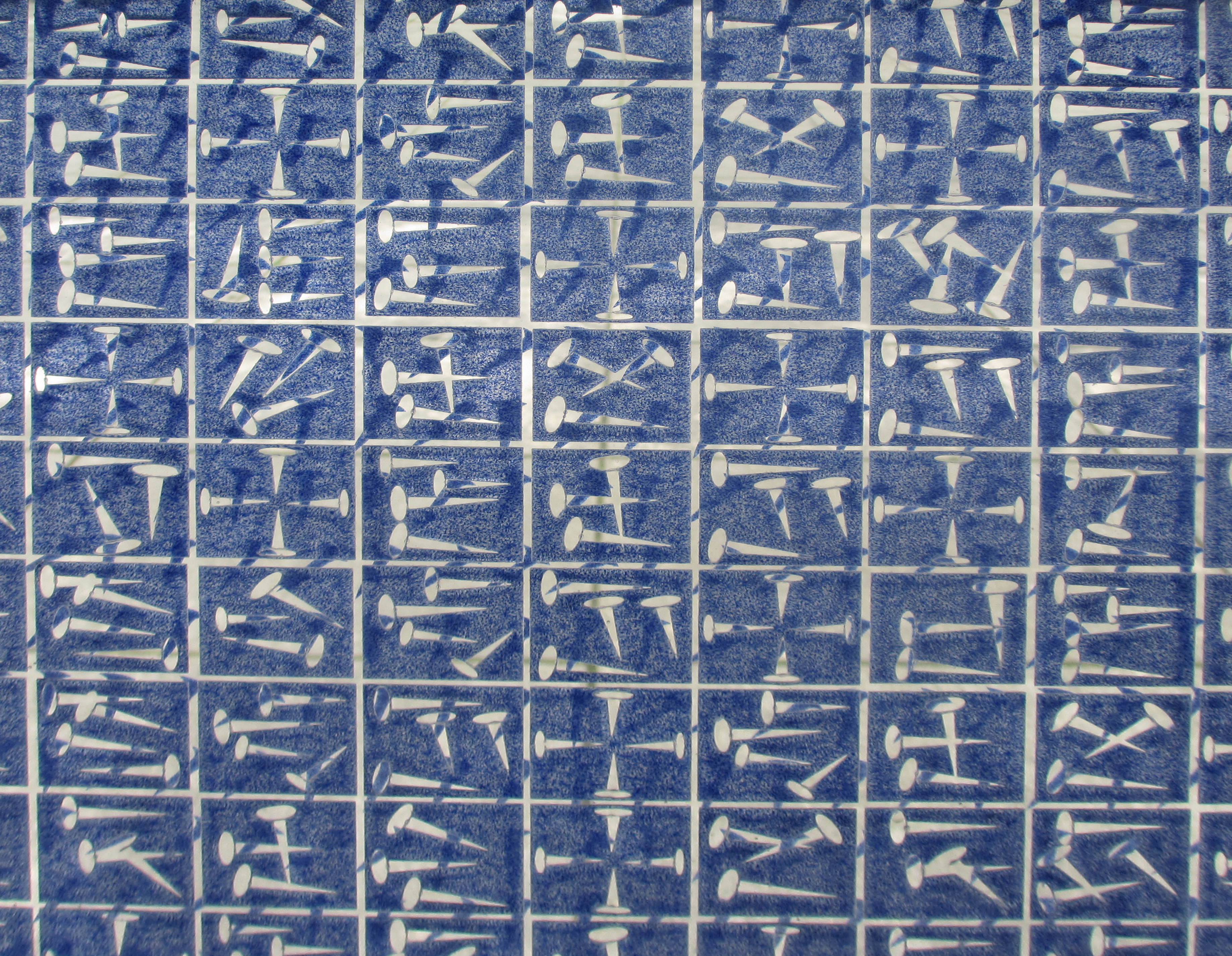 Glasfläche der Tore in der Hert-Jesu-Kirche München. Die Vorderseite besteht aus 24 mal 18 Quadraten, die wiederum aus kleinen Quadraten bestehen, auf denen sich Muster aus stilisierten weißen Nägeln befinden. Ein von Alexander Beleschenko eigens entwickelter Code für die Anordnung dieser Nägel (in Anlehnung an die Keilschrift) zitiert in immer wiederkehrender Form die Passionsgeschichte nach Johannes 18–20. Durch eine zweite Glasschicht, diesmal mit blauen Nägeln auf durchsichtigem Glas, erscheinen einige Teile der Fläche in einem dunkleren Blau, ein hellblaues Kreuz wird dadurch schemenhaft deutlich.